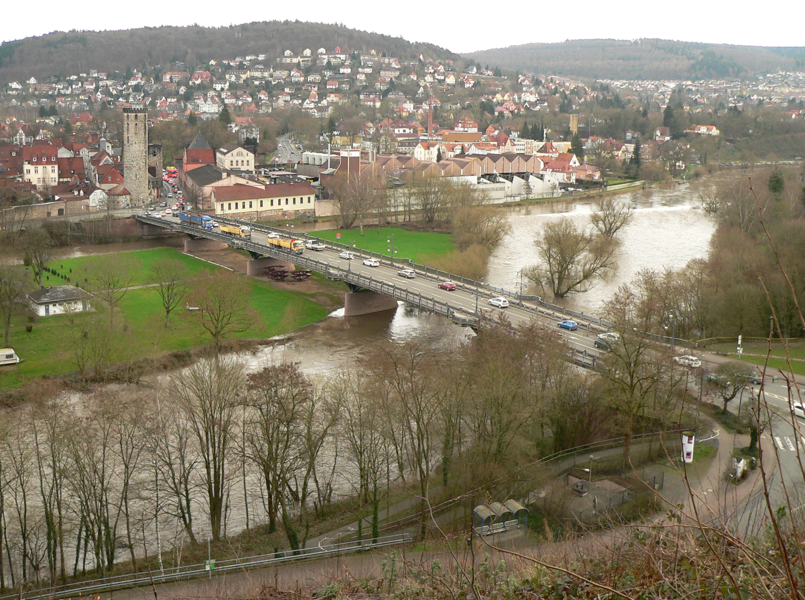 Pionierbrücke